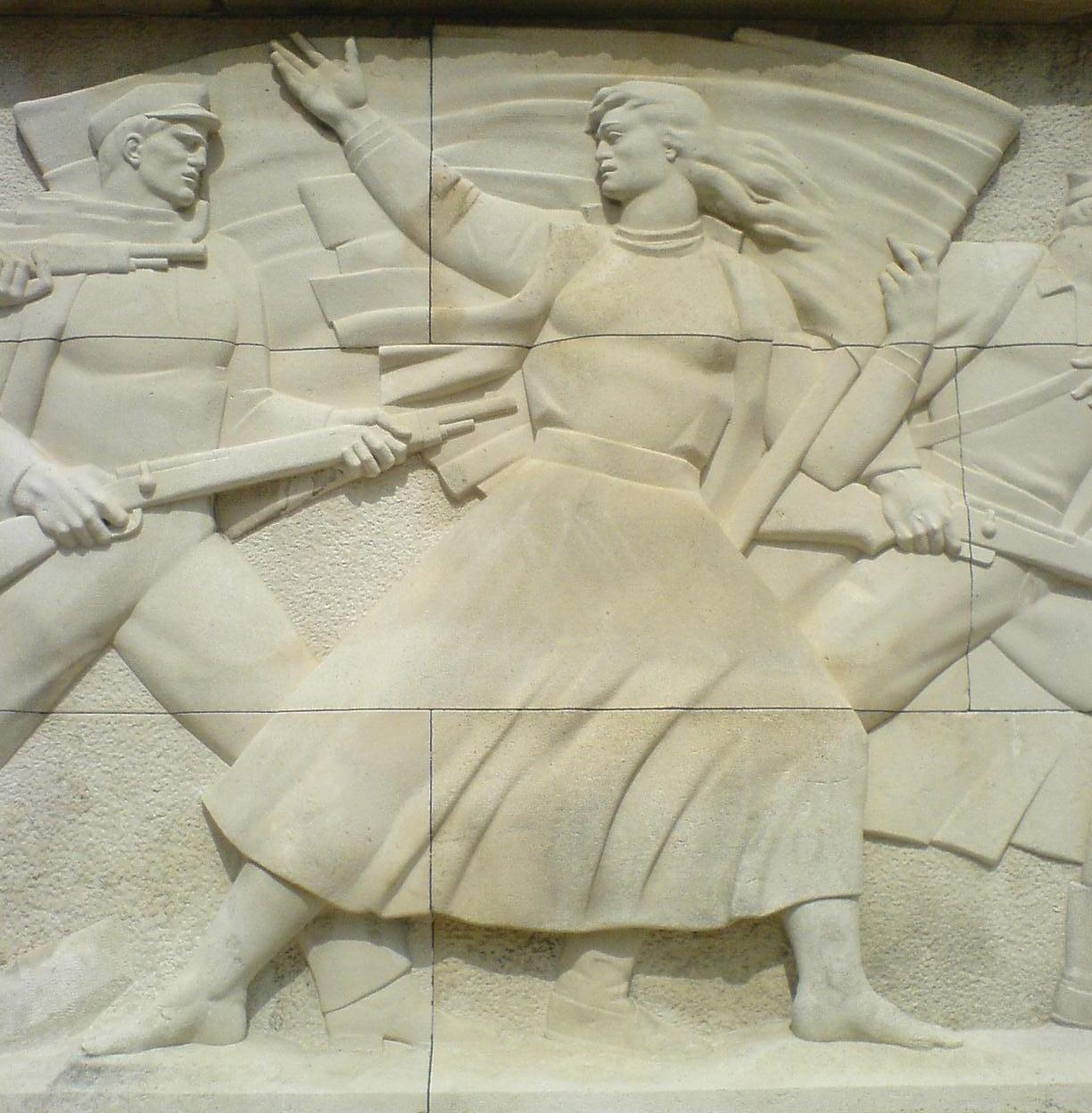 Žena heroj, detalj.